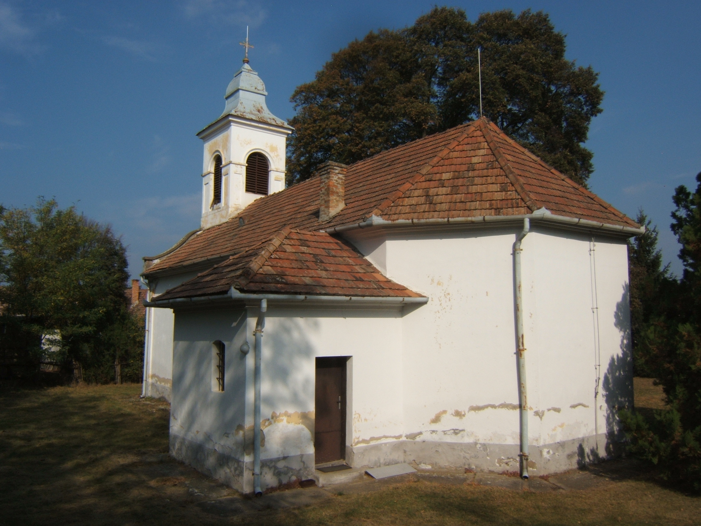 Felpéc, katolikus templom, barokk, 1752. Berendezés: főoltár, barokk, 1750 körül. azonosító: 4046 törzsszám: 3531 - Győr-Moson-Sopron , Felpéc. Táncsics u.